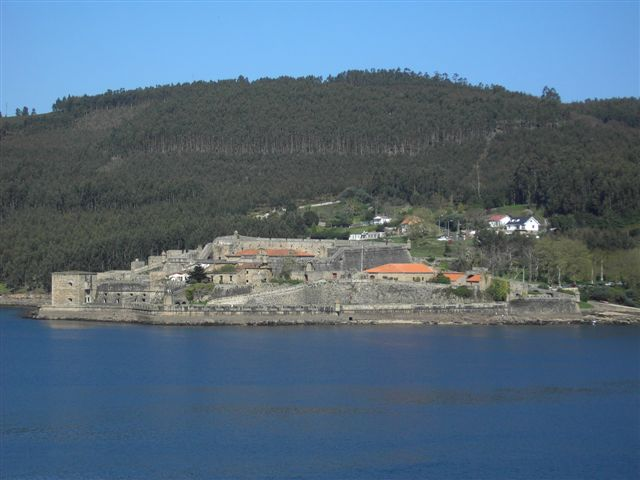 Castelo de San Filipo Ría de Ferrol, Galicia, Spain.